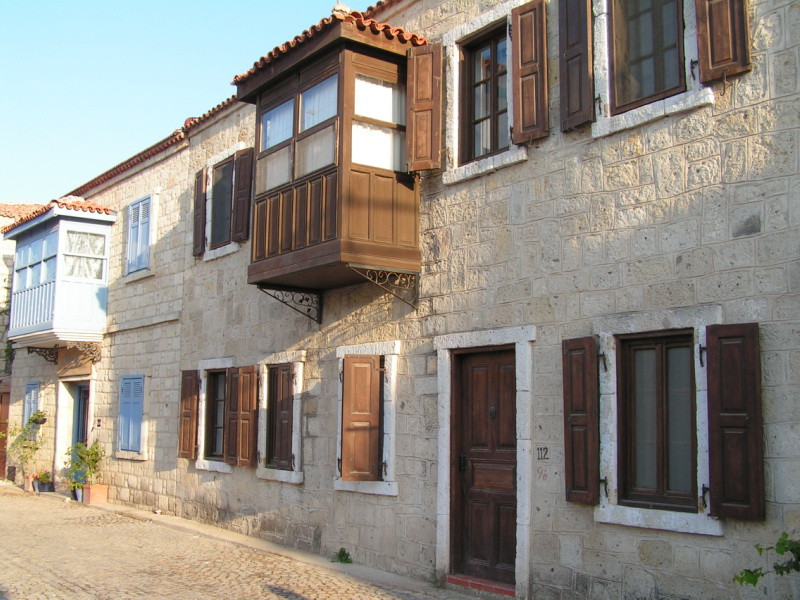 Houses in Alaçatı